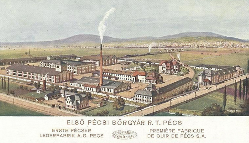 Régi képeslap az Első Pécsi Bőrgyárról